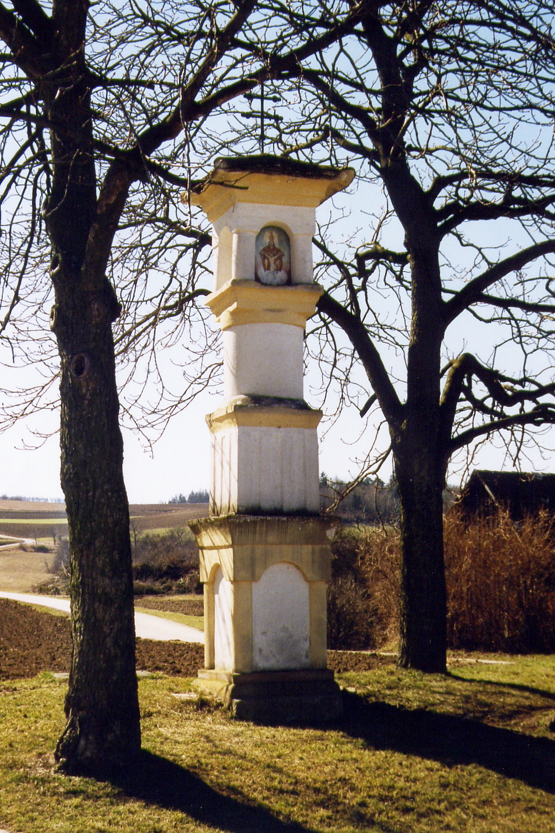 Denkmalgeschütztes Marterl in Obritzberg